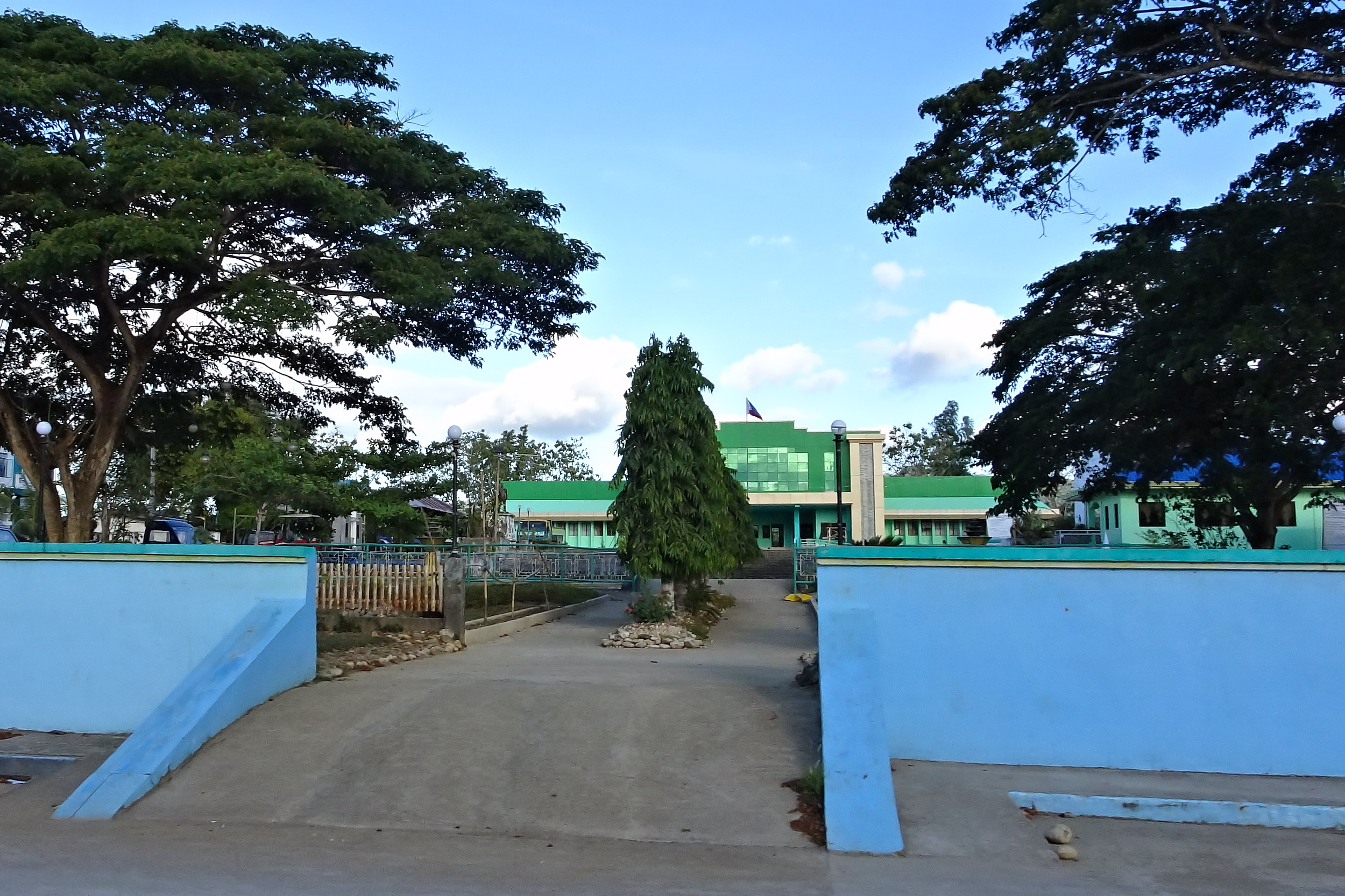 Pilar, Bohol, Philippines